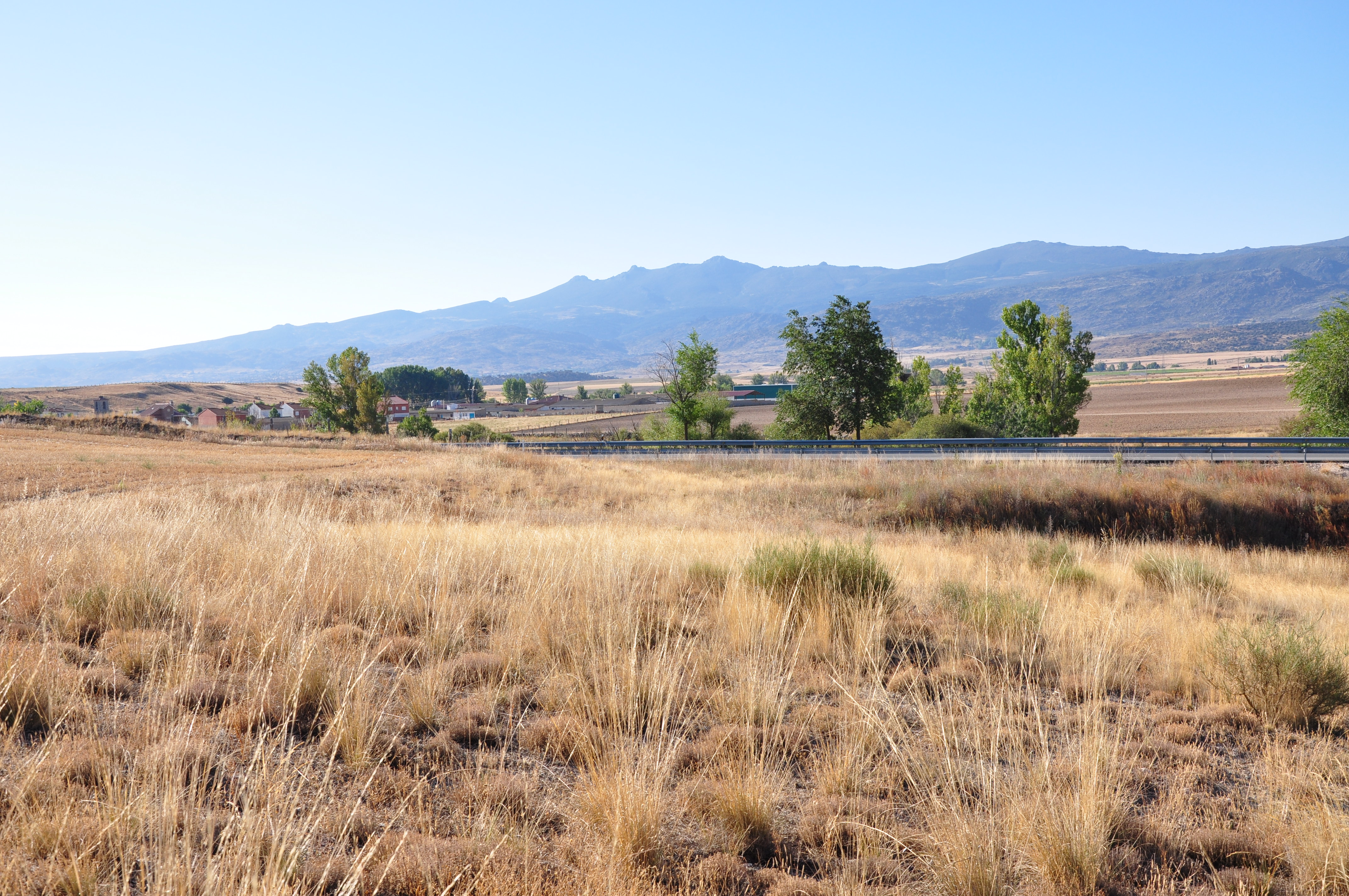 Vertiente norte de la Sierra de la Paramera desde el Valle de Amblés (Ávila), España.